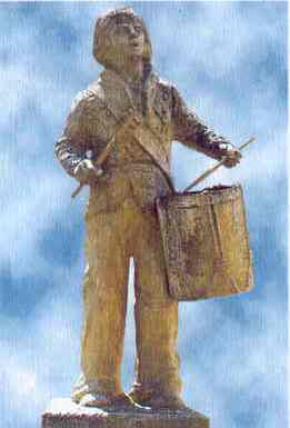 Statue de Pierre Bayle à Tourreilles (Aude)